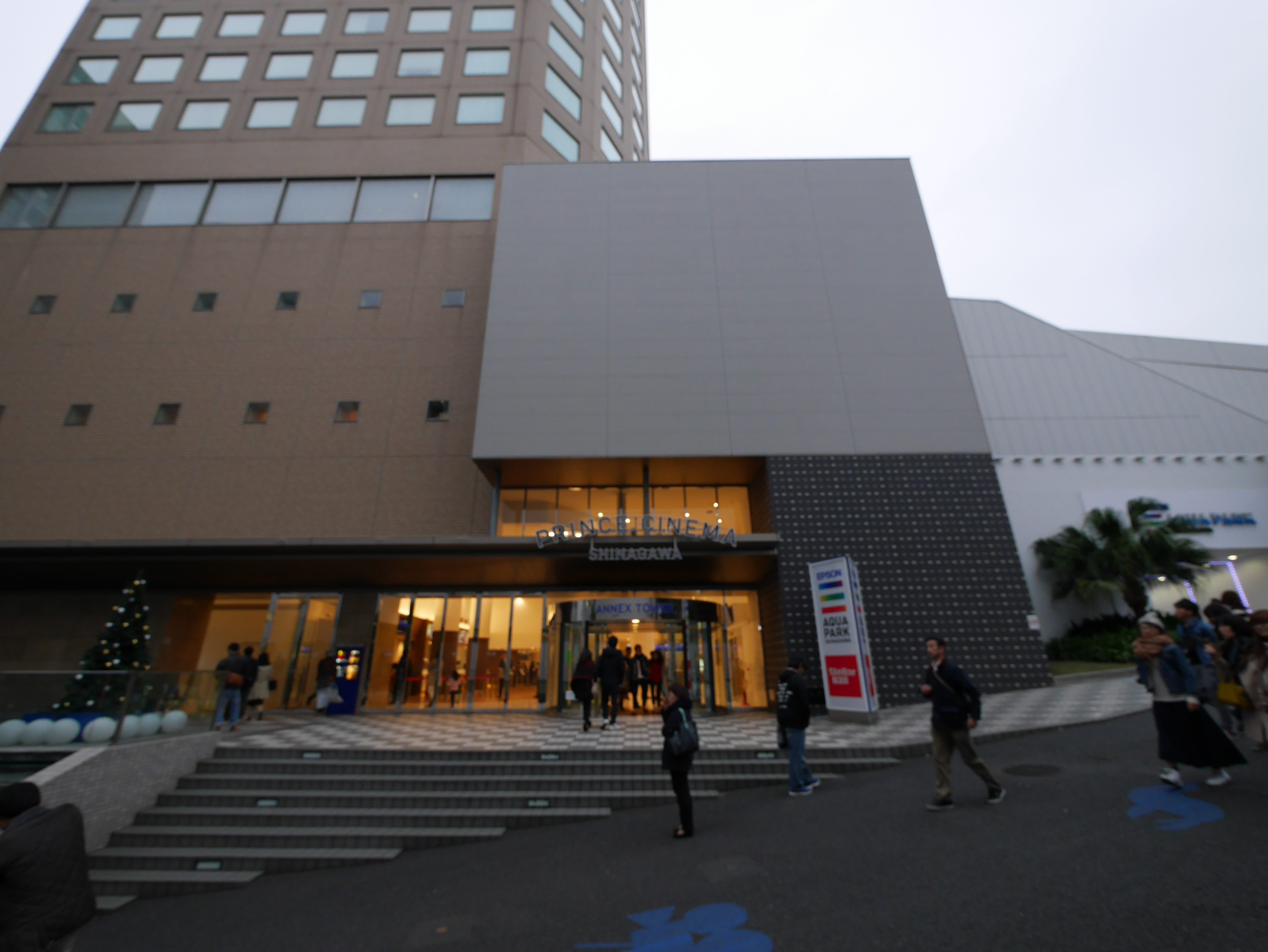 3 Chome-26 Takanawa, Minato-ku, Tōkyō-to 108-0074, Japan